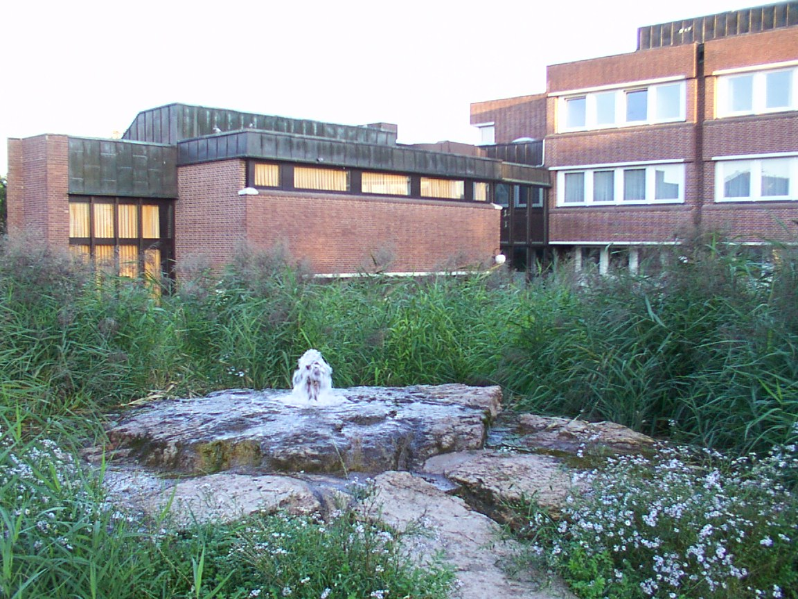 Salzkotten: Unitasquelle, im Hintergrund das Rathaus